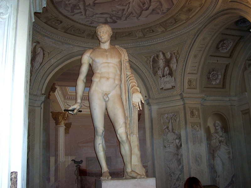 Castellazzo di Bollate - Statua di Pompeo Magno all'interno di Villa Arconati